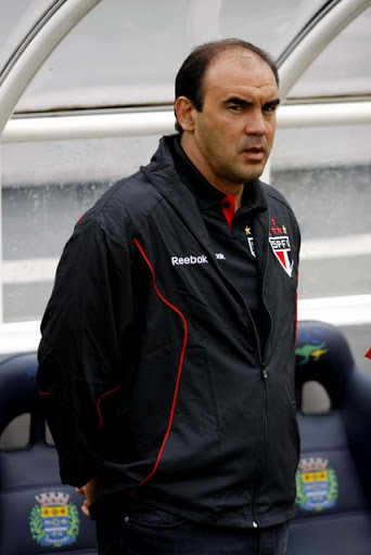 Ricardo Gomes como treinador do São Paulo em 2010.